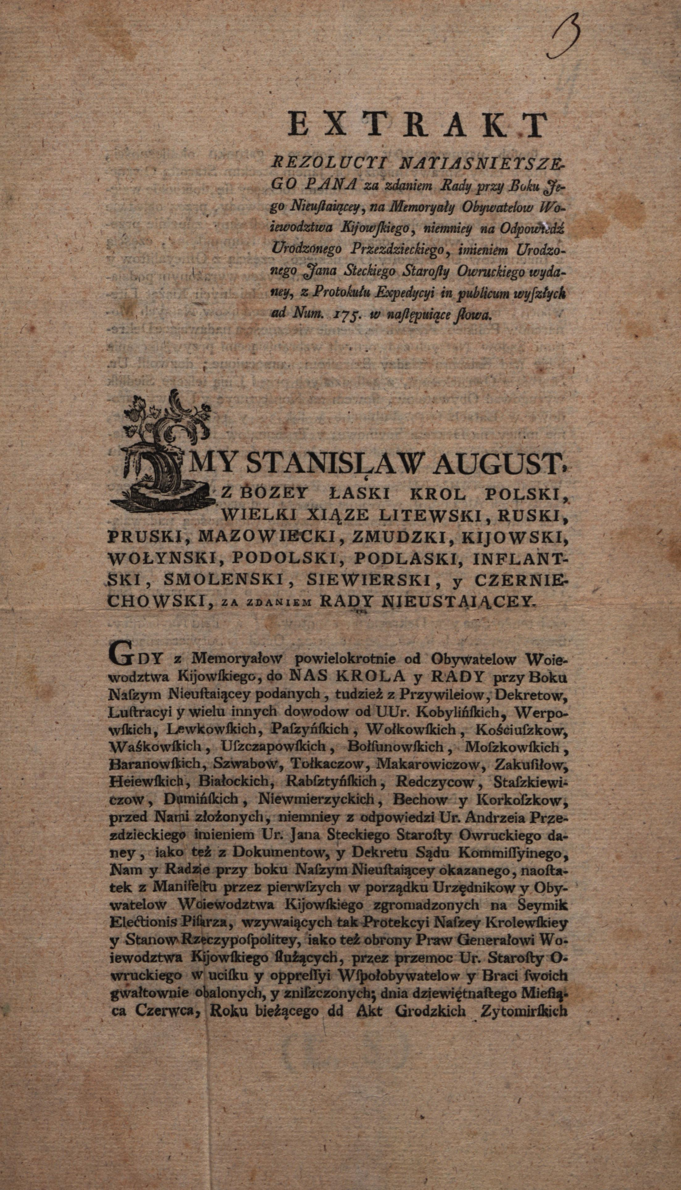 Экстракт короля Станислава Понятовского освобождающий Левковских и других шляхтичей от преследований овручского старосты Яна Стецкого и обязал его восстановить их в имущественных и дворянских правах